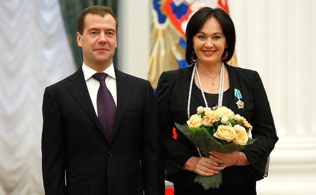 МОСКВА, КРЕМЛЬ. Церемония вручения государственных наград. Орден Дружбы вручен актрисе Ларисе.Гузеевой